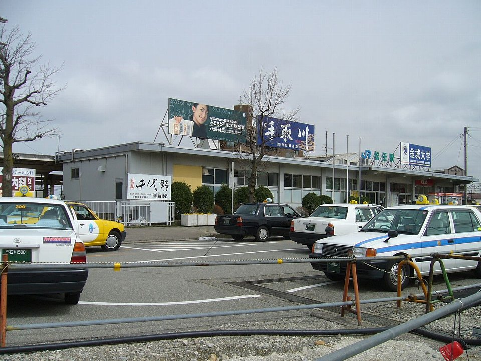 松任駅 南口